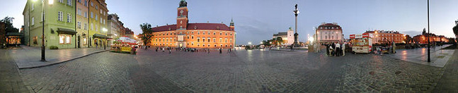 Panoramic photo Warsaw, Poland